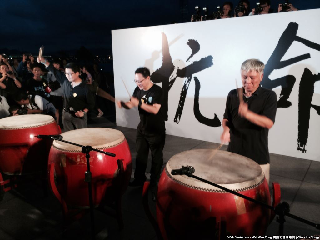 中文（台灣）: 香港和平佔中三位發起人（右起）朱耀明、戴耀廷、陳健民在啟動佔中"公民發聲"集會開始前，在台上用力擊鼓，寓意港人繼續為爭取普選發聲